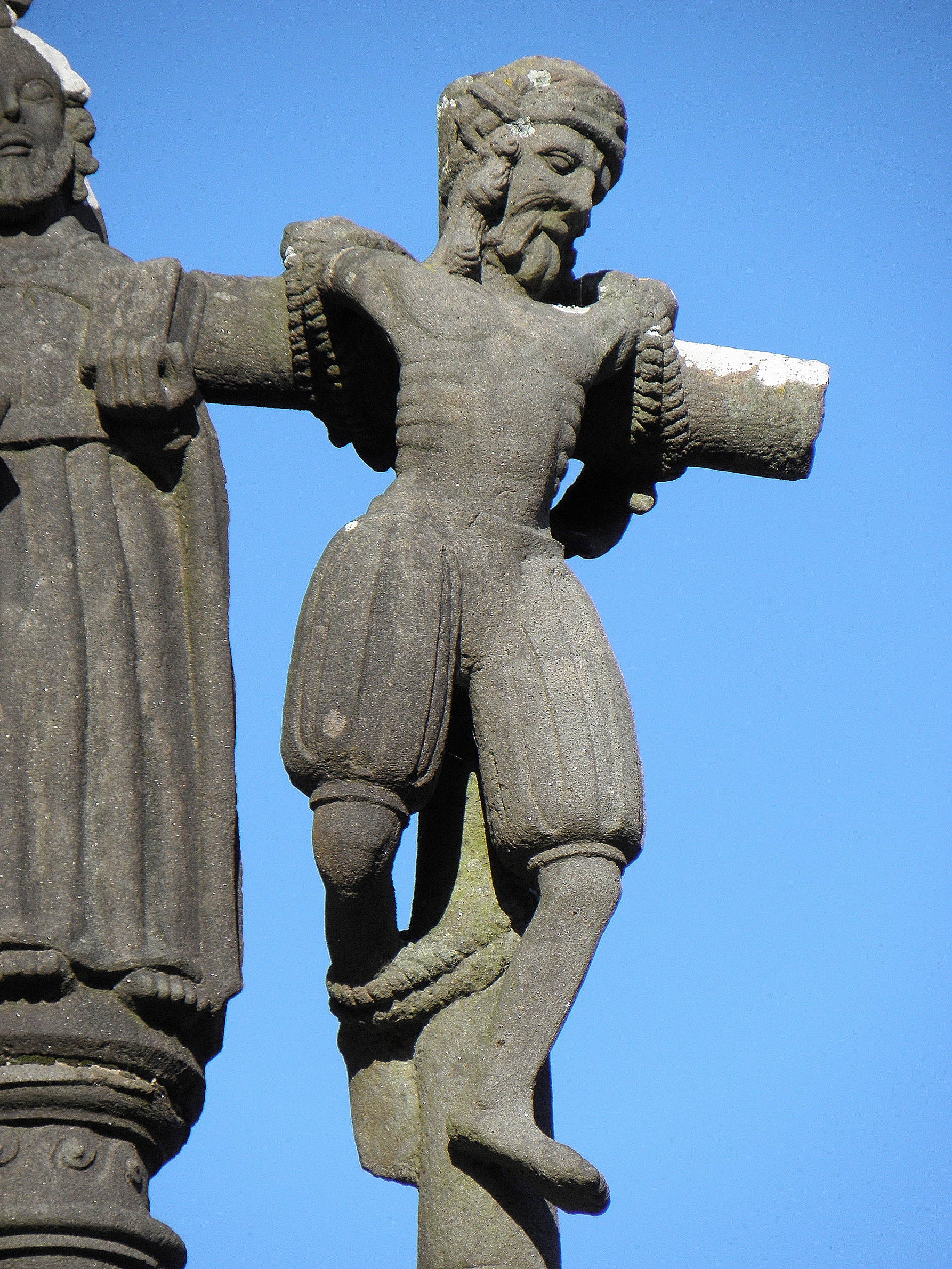 Le mauvais larron. Face ouest du calvaire de Saint-Thégonnec (29). .